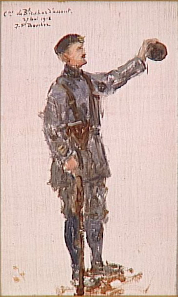 Portrait du capitaine de Blic (chars d'assaut), 27 mai 1918, par Bouchor